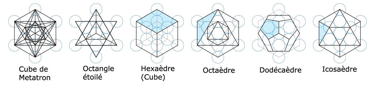 Les différentes composantes de la Fleur de Vie